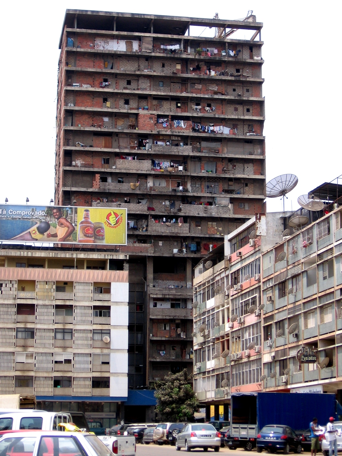 Musseque vertical (vertival slum), Luanda, Angola